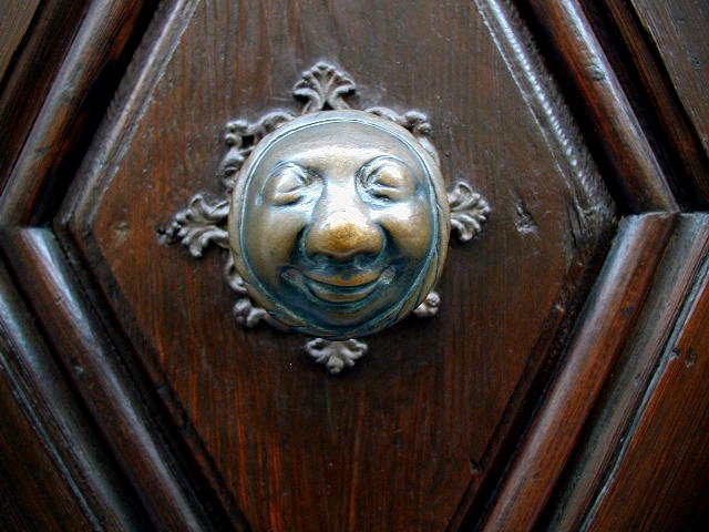 Türknauf, der als "Apfelweib" in E.T.A. Hoffmanns Der goldene Topf auftaucht, am Stahlschen Schwesternhaus in Bamberg.